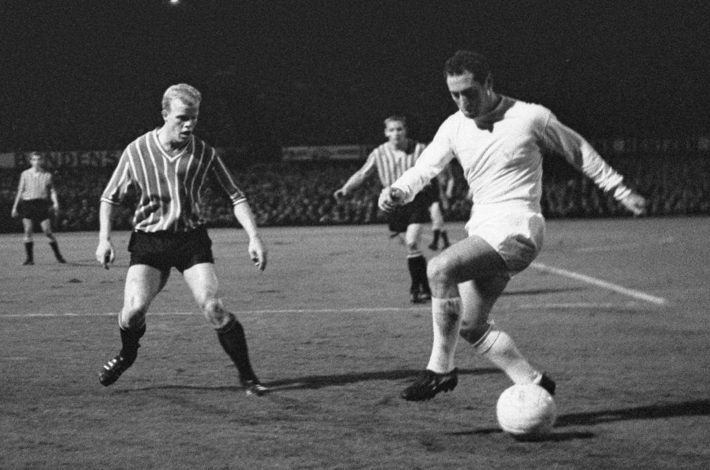 Feyenoord tegen Real Madrid 2-1, spelmomenten. Gento (cropped).